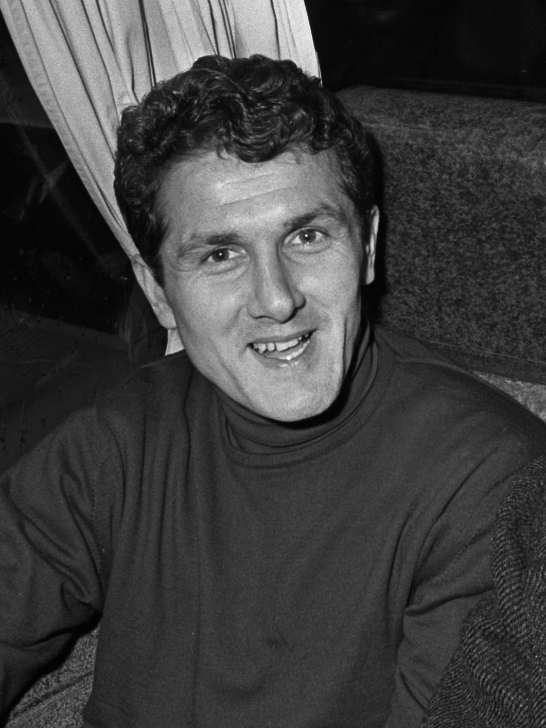 FC Servette speler Jean-Claude Schindelholz met rechts trainer Bela Gutman in de bus 15 november 1966